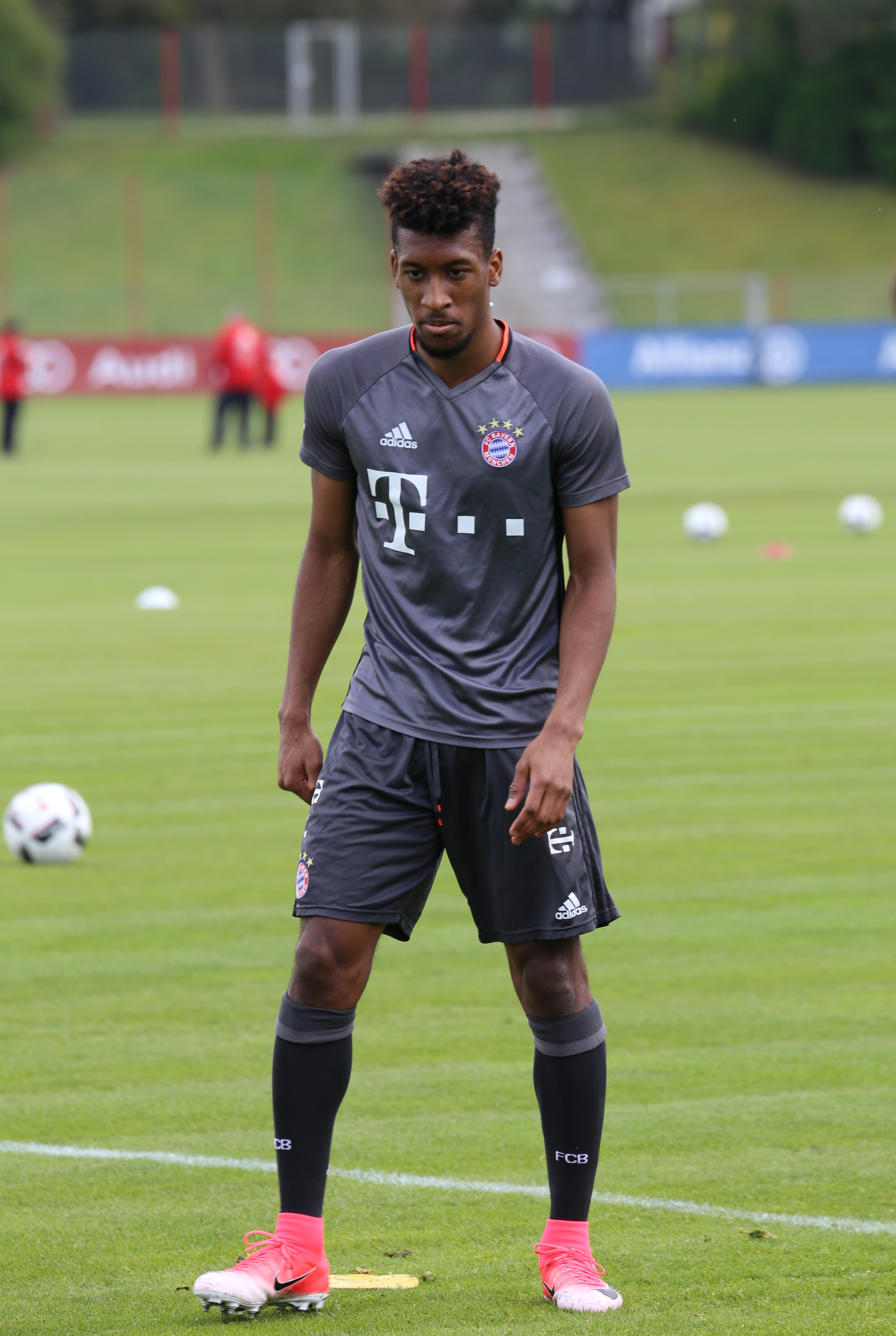 Kingsley Coman, am 3. Mai 2017 beim Training auf dem Gelände des FC Bayern München